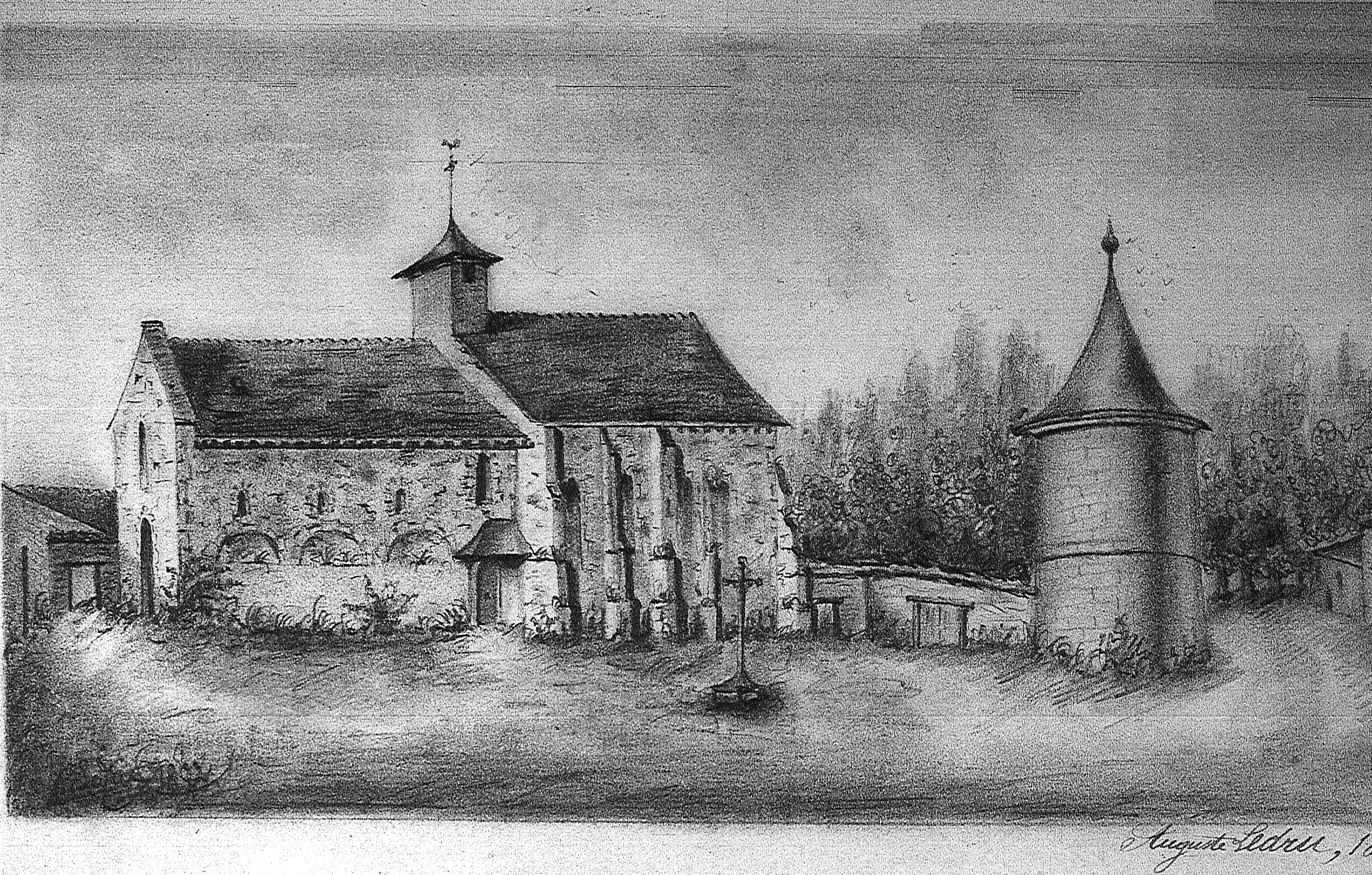 image issu du fond iconographique de la bibliothèque municipale.